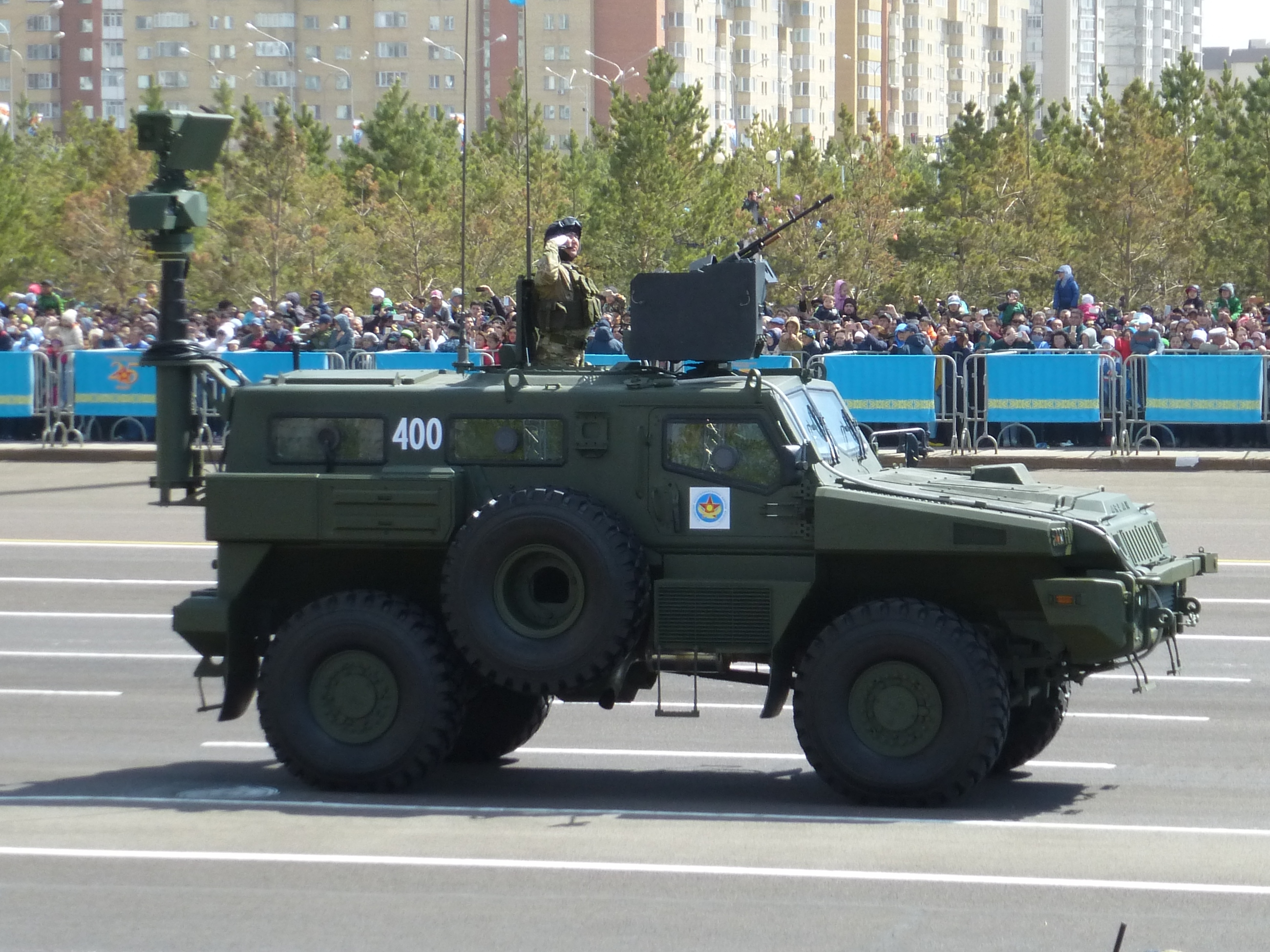 БКМ «Арлан» производства "Казахстан Парамаунт Инжиниринг". Военный парад в Астане. 07.05.2017